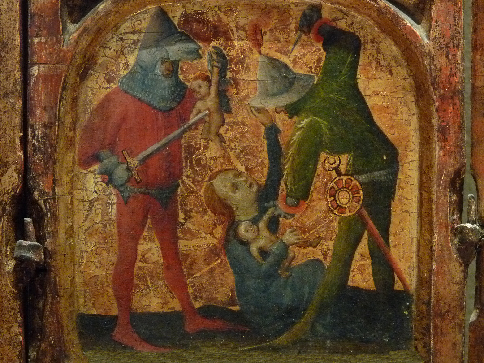 Detail 19 - Massacre of the Innocents - Louvre - - See more Details (Détails – Particulari – Detalles)